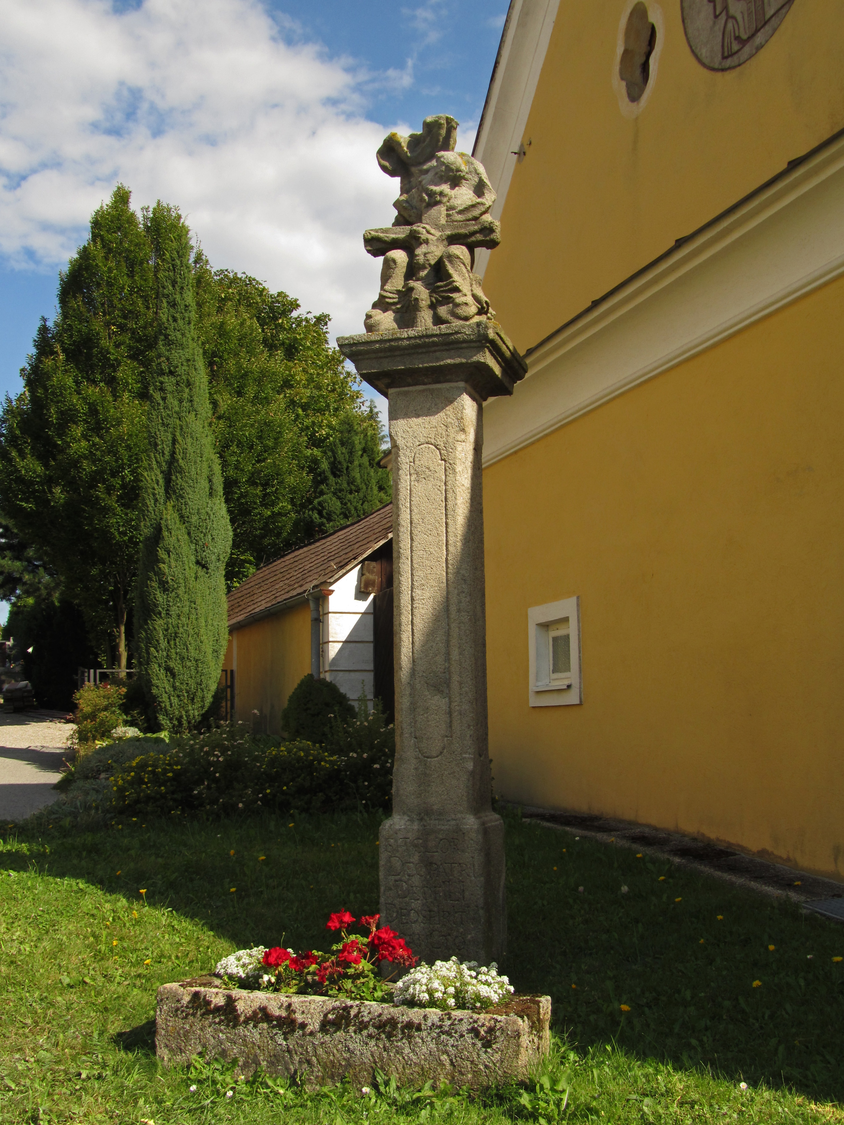 Diese barocke Dreifaltigkeitssäule – ein Gnadenstuhl auf rechteckigem Pfeiler – ist im Chronogramm mit „1713“ bezeichnet. Sie besteht aus Granit und wurde im Zuge einer Straßenerweiterung vom Neuwirtshaus an ihren heutigen Standort zwischen Kirche und Pfarrhof versetzt.